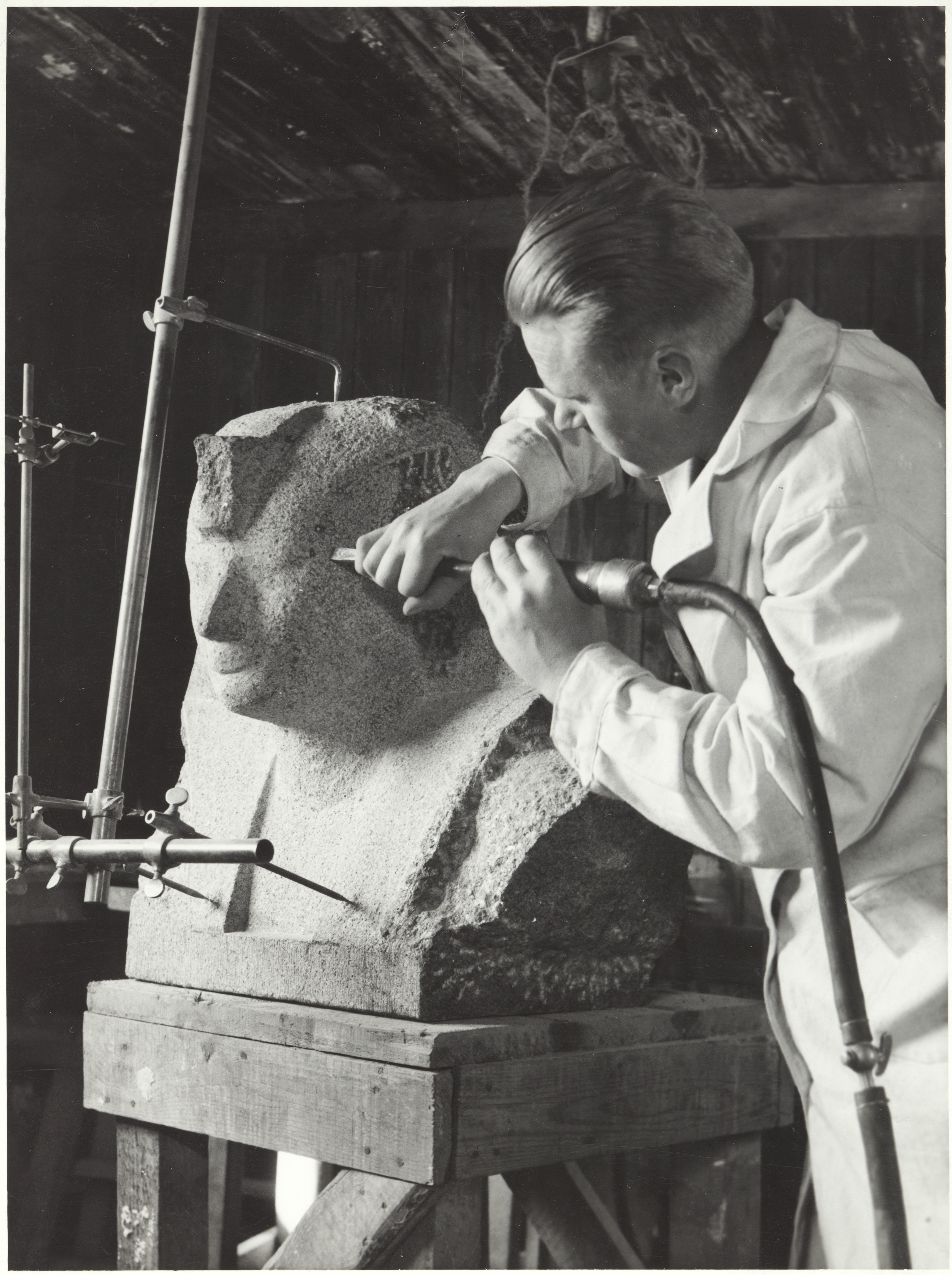 Kuvanveistoa kivestä, 1930-luku. Taideteollisuuskeskuskoulun opetustilanteita. Aalto-yliopisto / Aalto University Tiedätkö lisää tästä kuvasta? Jätä kommentti tai ota yhteyttä sähköpostitse: Lisätietoja kuvakokoelmista / more information